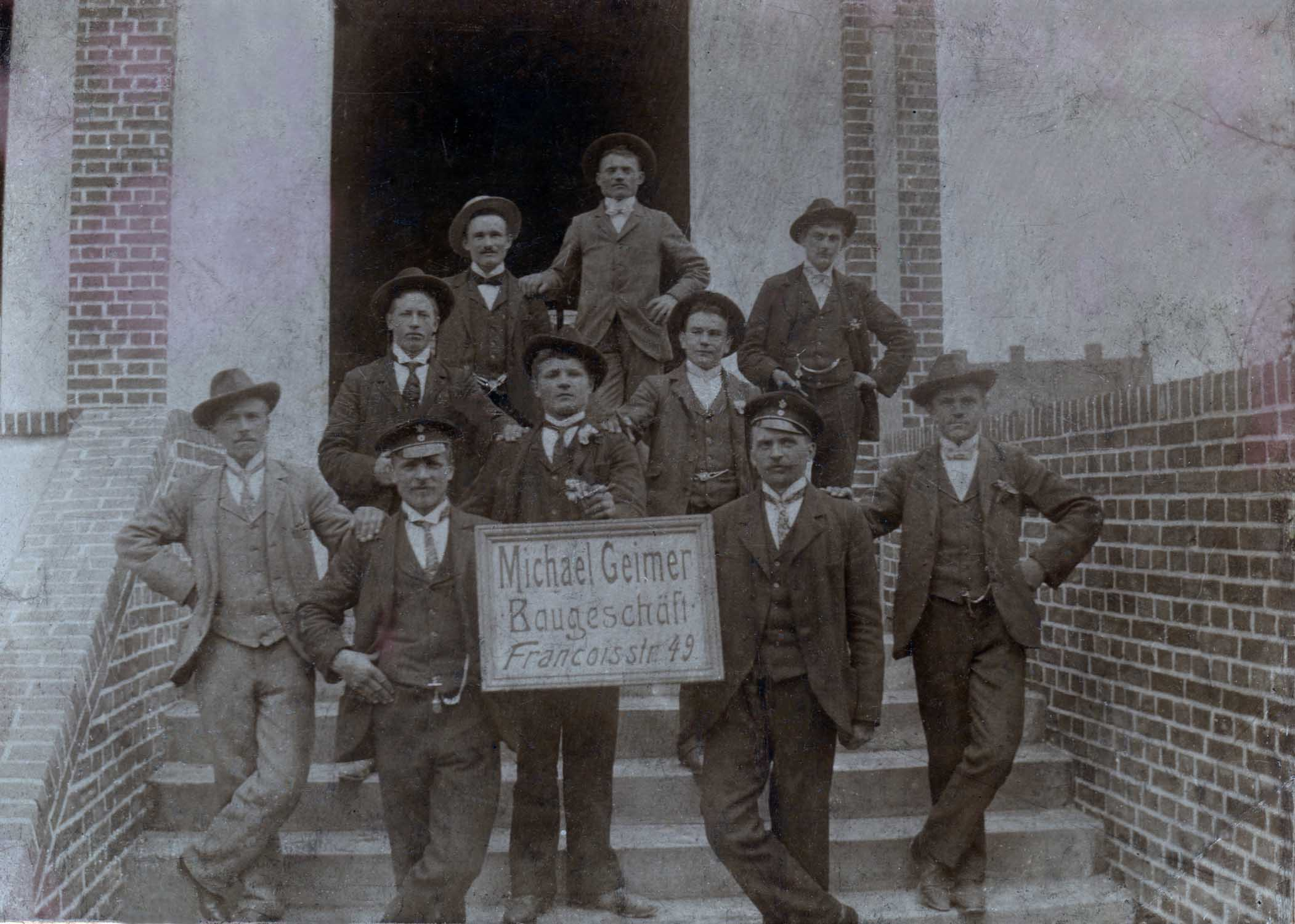 Louis Cobai 1885-1942), né à Monteaperta (Italie), maître d'oeuvre et soldat de la première guerre mondiale, à la société Michael Geimer de Sarrebruck (Sarre) entouré de ses frères, de ses cousins et de ses collaborateurs. Décédé à Carling (Moselle) en 1942.